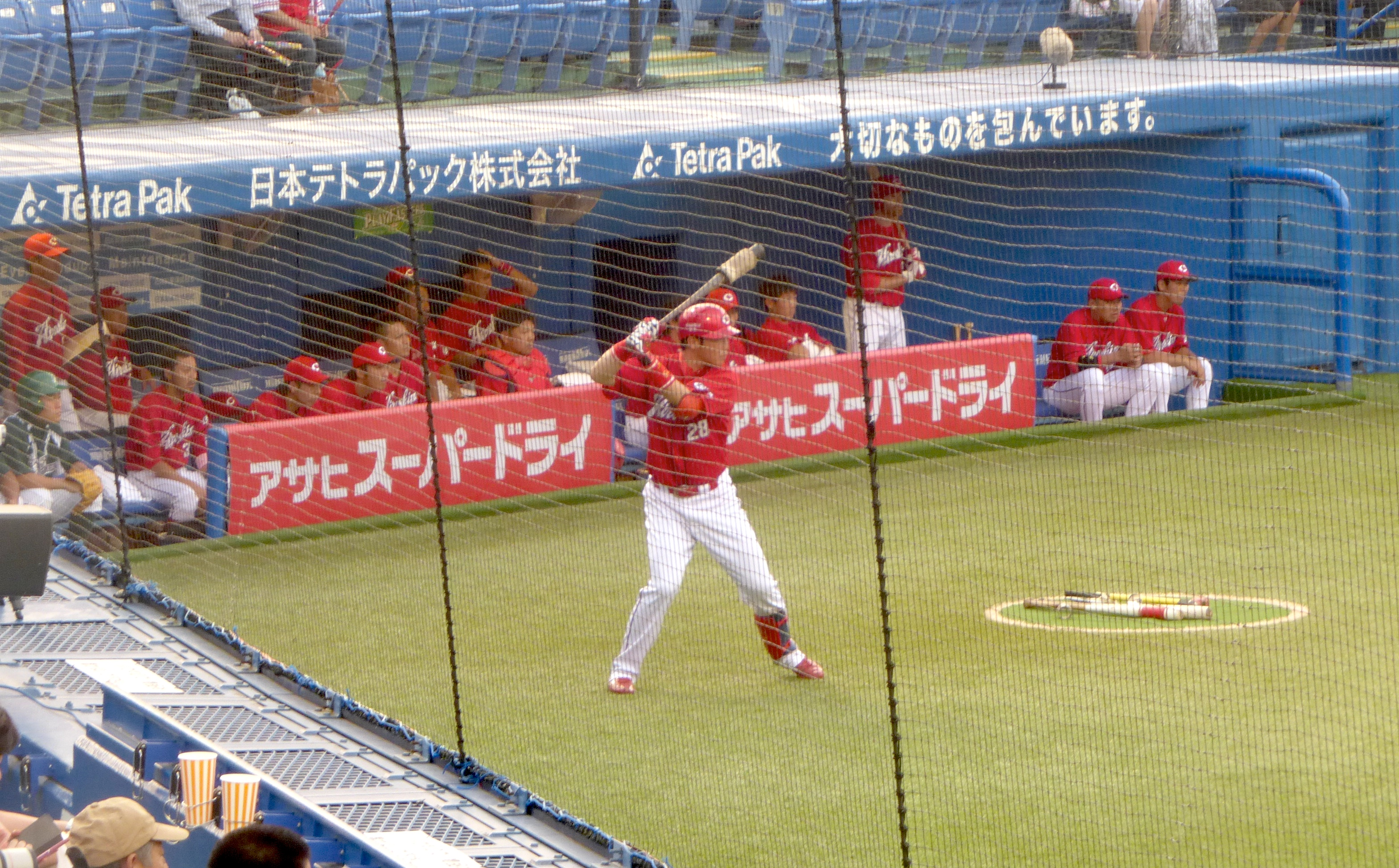 新井貴浩 (Takehiro Arai)